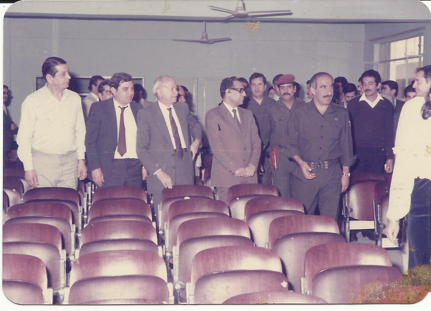 صورة الوزير العراقي سمير الشيخلي وزير التعليم العالي والبحث العلمي مع الاستاذ جاسم شهاب أحمد الحياني مؤسس الجامعة التكنولوجية، ويظهر الاستاذ جاسم الثالث من اليسار في الصورة